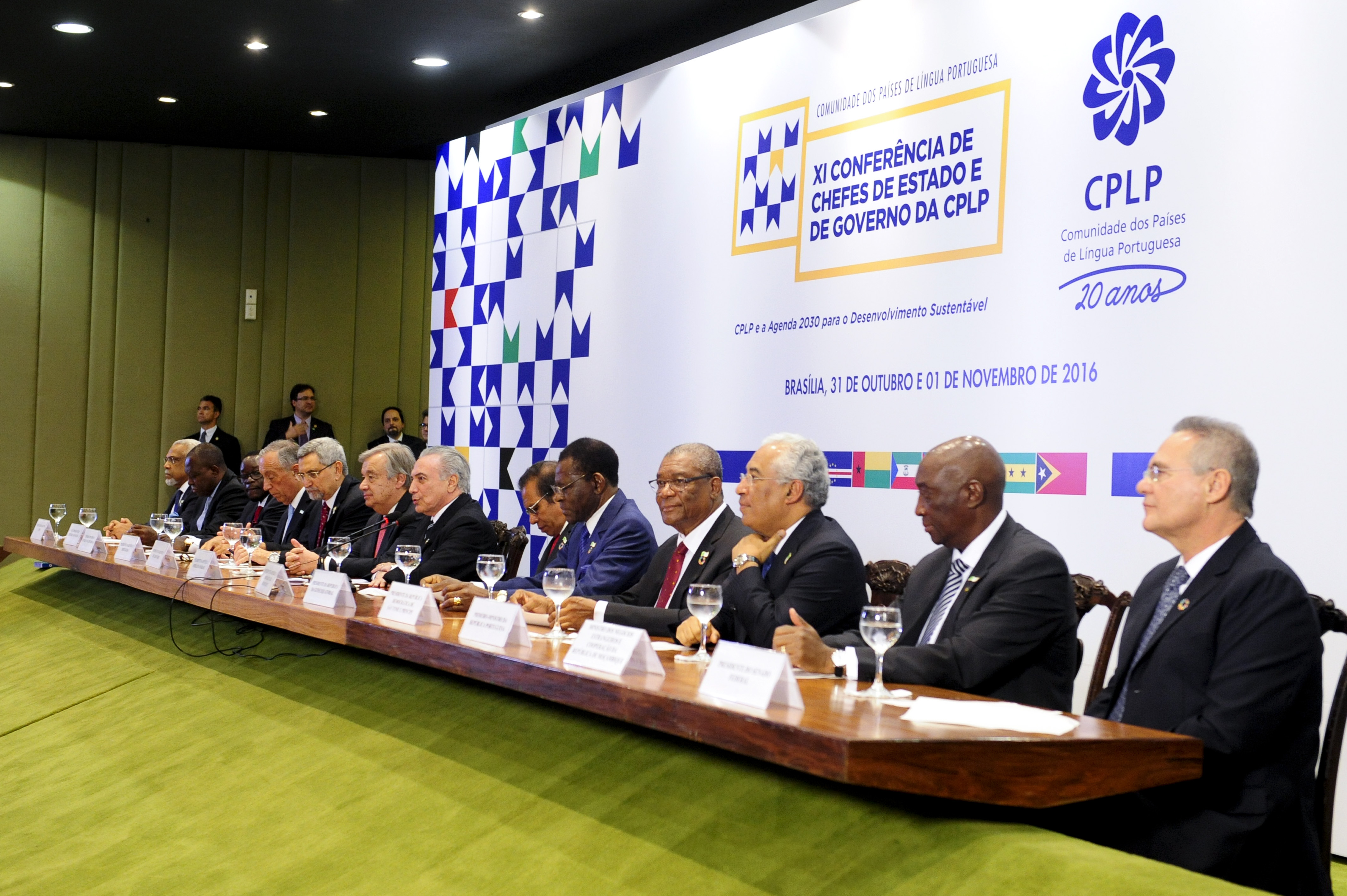 Presidente da RepÃºblica Michel Temer e o presidente do Senado Federal, senador Renan Calheiros (PMDB-AL) participam da XI ReuniÃ£o de chefes de Estado e de Governo da ComissÃ£o de PaÃ-ses da Comunidade da LÃ-ngua Portuguesa (CPLP), no PalÃ¡cio Itamaraty. Foto: Jonas Pereira/AgÃªncia Senado